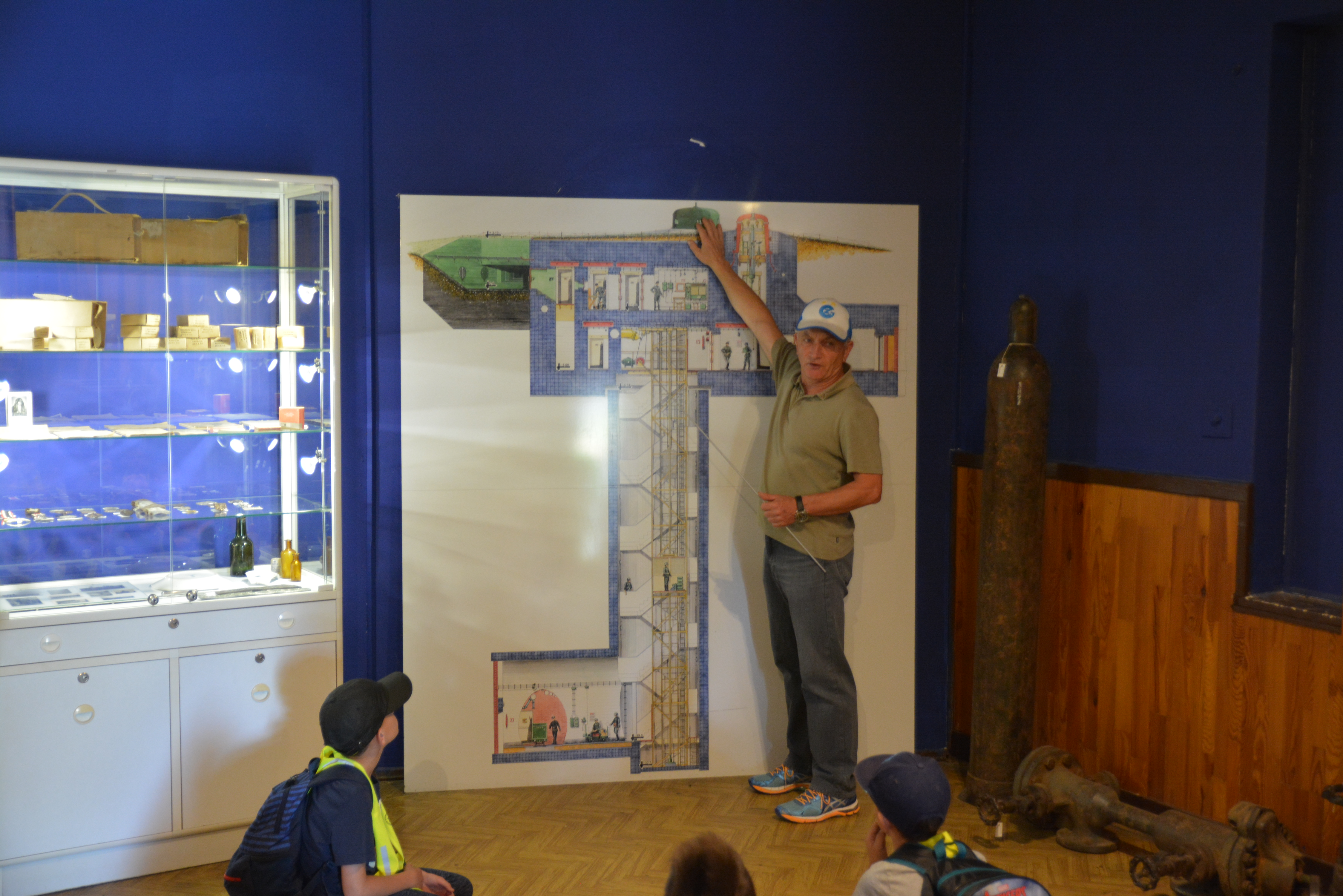 MRU - Muzeum Fortyfikacji i Nietoperzy w Pniewie